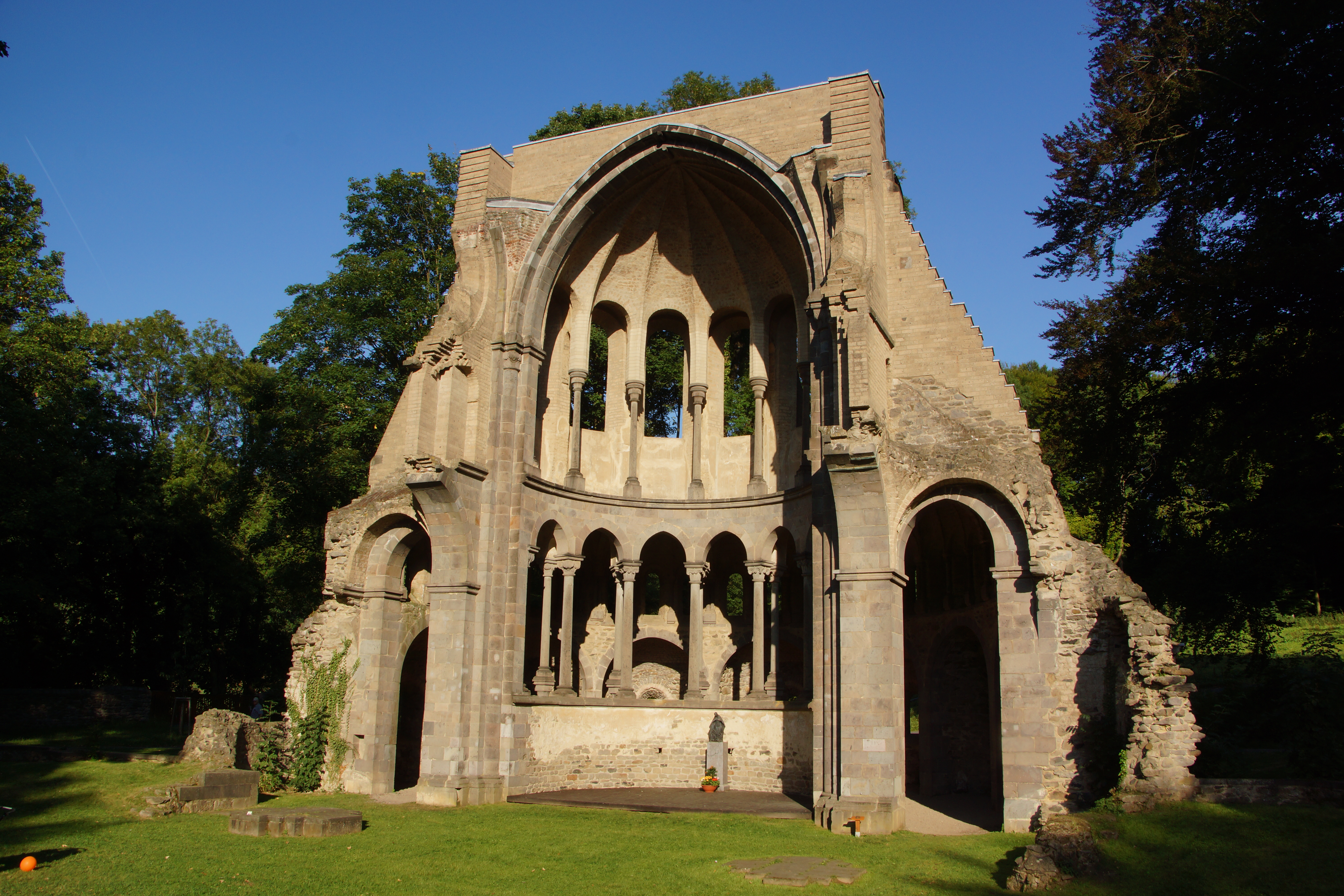 Chorruine Kloster Heisterbach in Königswinter